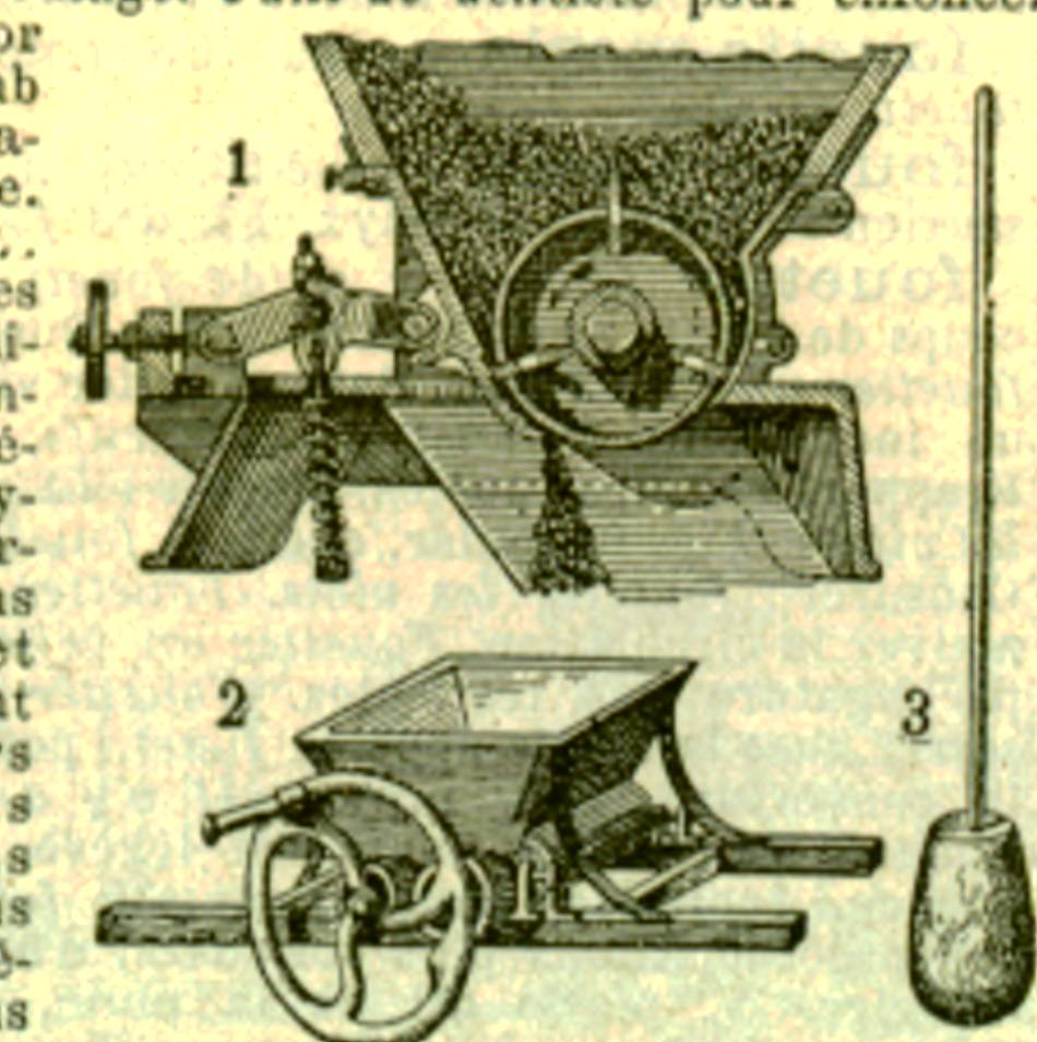 Schémas de fouloirs